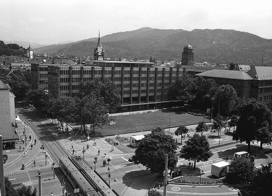 Freiburg im Breisgau: Platz der Synagoge (ehem. Europaplatz)